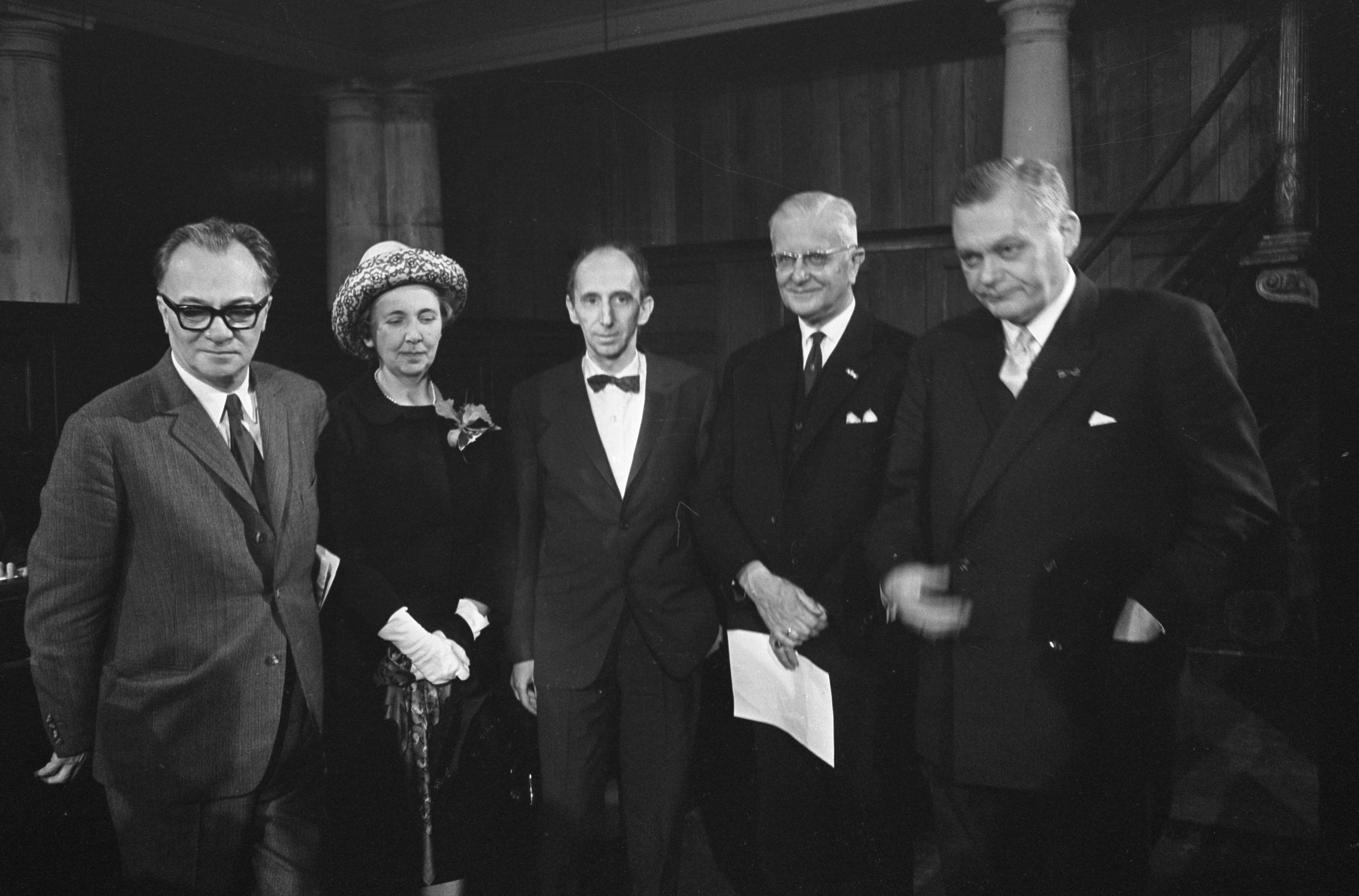 Herdenking Kunstenaarsverzet in Lutherse Kerk te Amsterdam v.l.n.r. Pieter 't Hoen (schuilnaam van Frans Goedhart), mevrouw Anne Berendsen, Leo Vroman, prof. mr. R.P. Cleveringa en Jan Smallenbroek.20 maart 1965 (=Uitreiking prijs kunstenaarsverzet 1964)